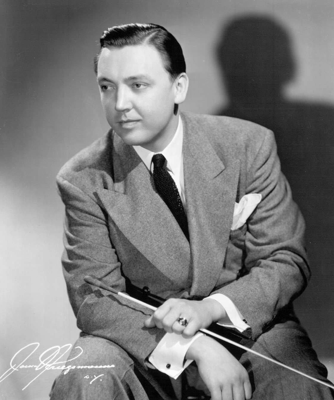 Alvino Rey